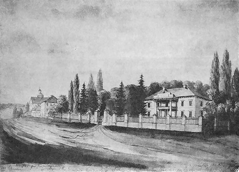 Dunajowce. Pałac Krasińskich, kościół i klasztor pokapucyński. Widok od strony drogi. Pałac dwukondygnacjowy z portykiem kolumnowym zwieńczonym schodkowym przyczółkiem oraz balkonem; z lewej strony w głębi budynki dawnego klasztoru oraz fragment kościoła z kopułą. Dat.: 19 Czerwca. Napis: Klasztor po Kapucynach; Dom Hr. Generała Krasińskiego w Dunajowcach tu urodził się Zygmunt Krasiński d. 23 Lutego 1811 ... [nieczytelne]; napis na podkładzie: Podole Dunajowce, - dom w którym urodził się Zyg. Krasiński. 1871-1873. Rys. ołówkiem podmalowany akwarelą. 20 x 27,4 cm. Muzeum Narodowe, Kraków. III-r.a. 2959. (Teka Podole).